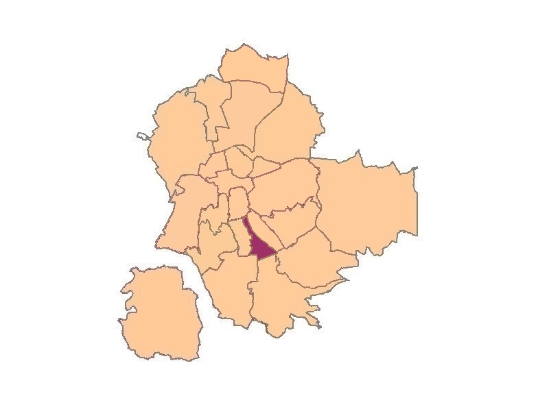 plan de saint-etienne quartier Saint-Roch Valbenoîte.